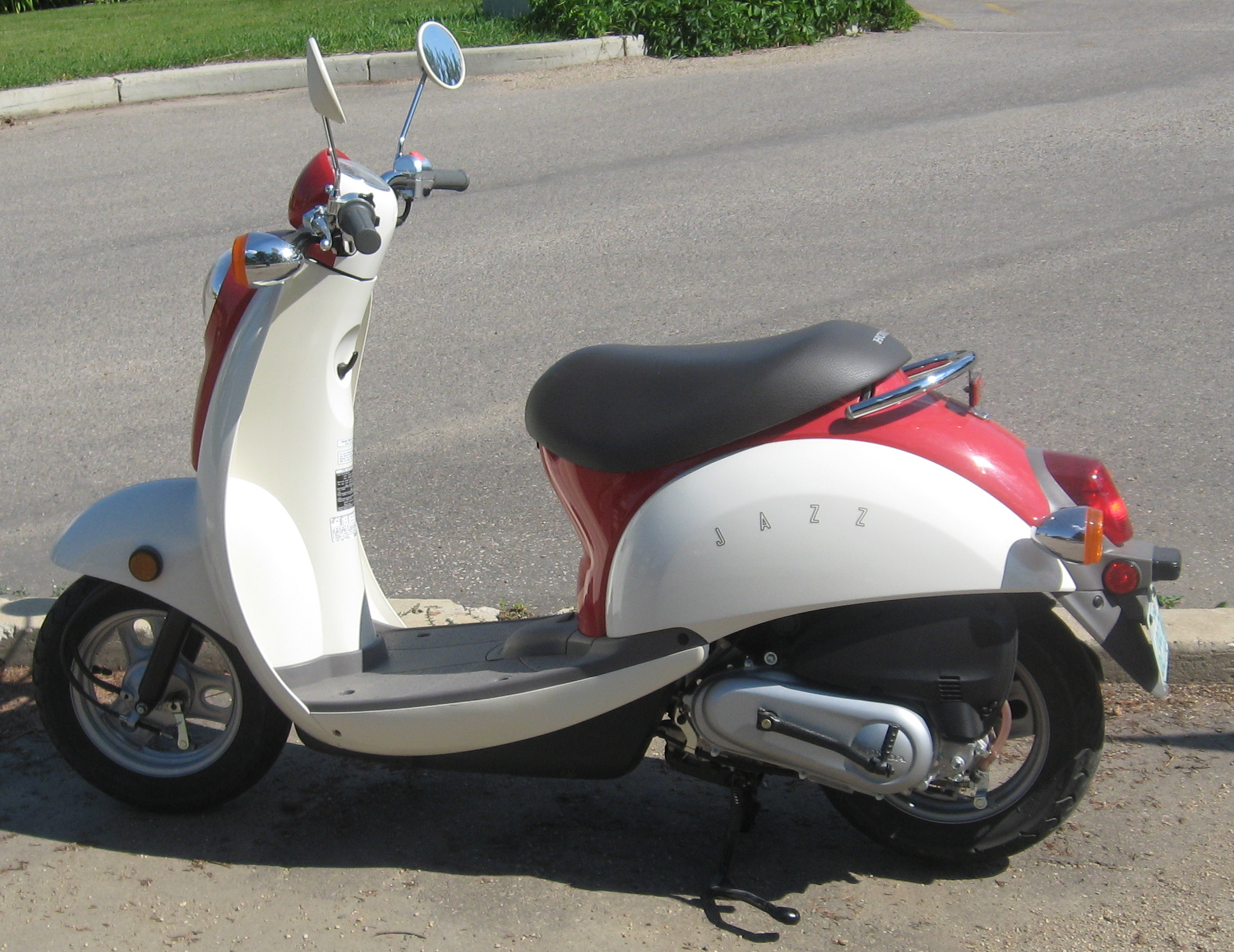 Honda Jazz scooter